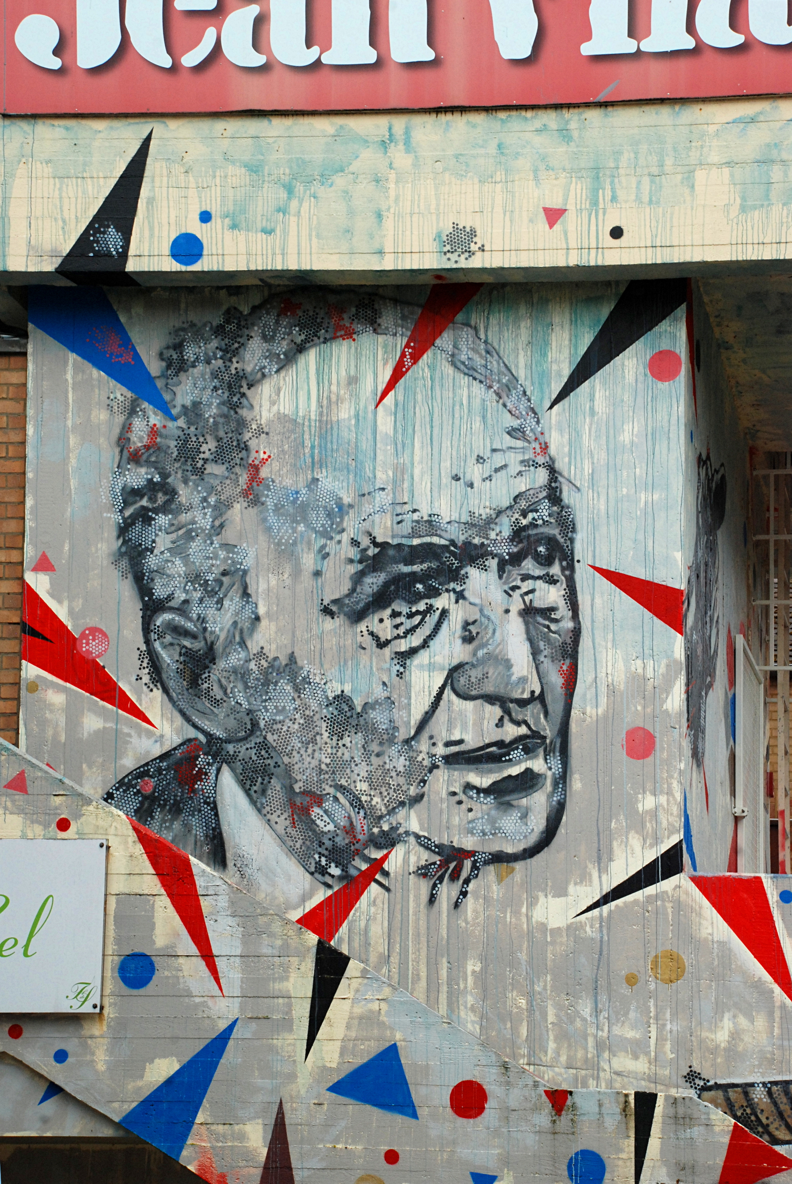 Belgique - Louvain-la-Neuve - Théâtre Jean Vilar - fresque du graffeur français Damien-Paul Gal (Kosmopolite Art Tour 2015)